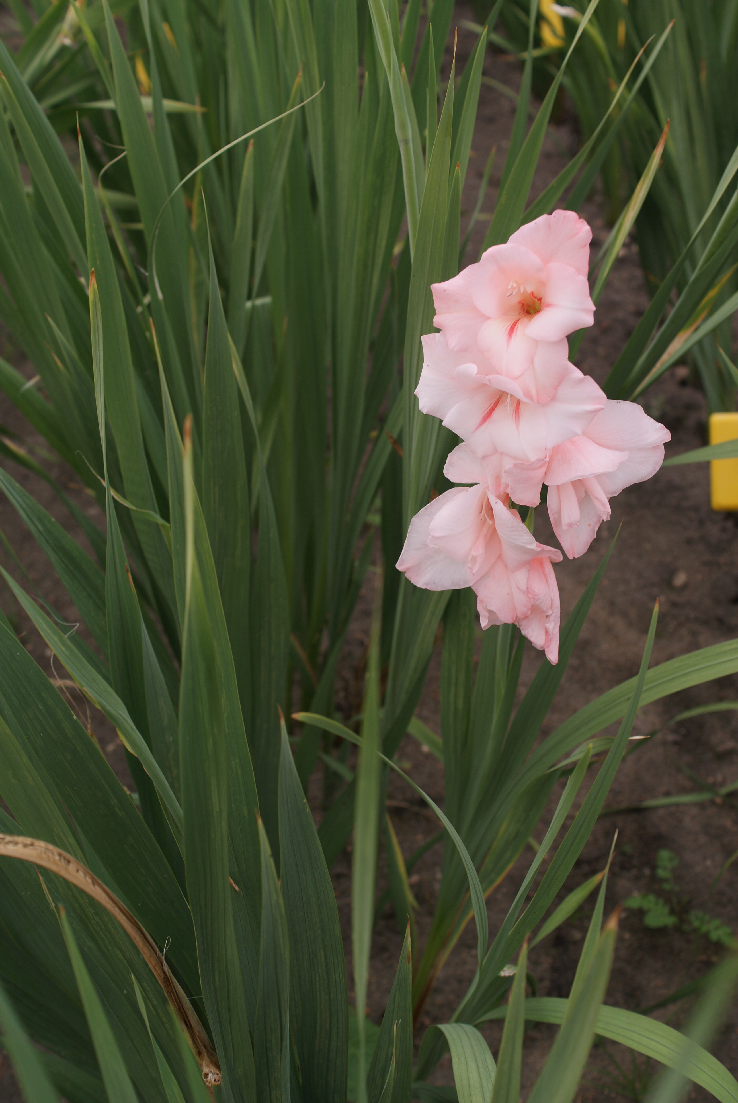 Gladiolus 'Alfred Nobel'